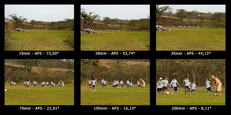 Exemplos de variação da distância focal.